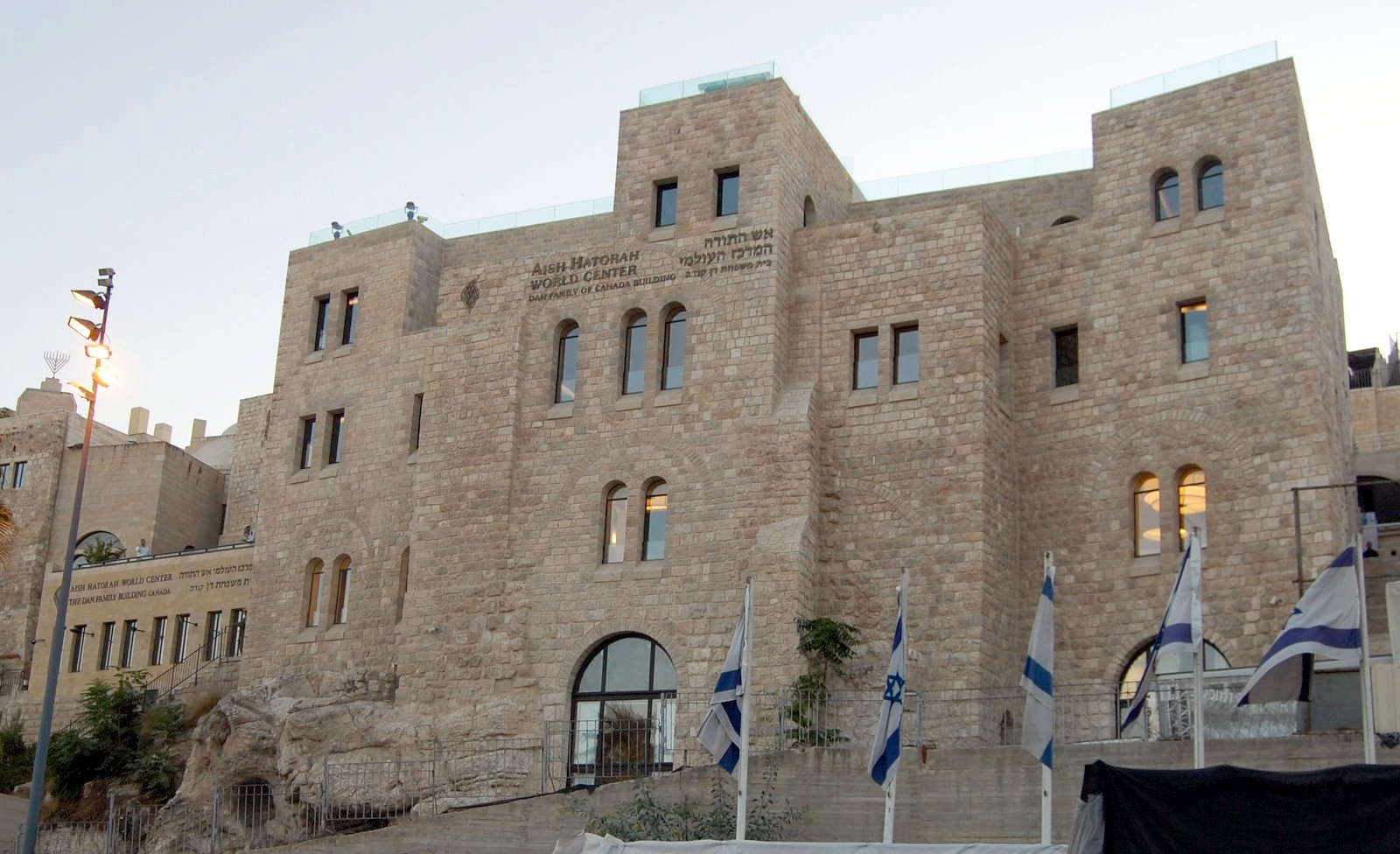 בניין ישיבת אש התורה